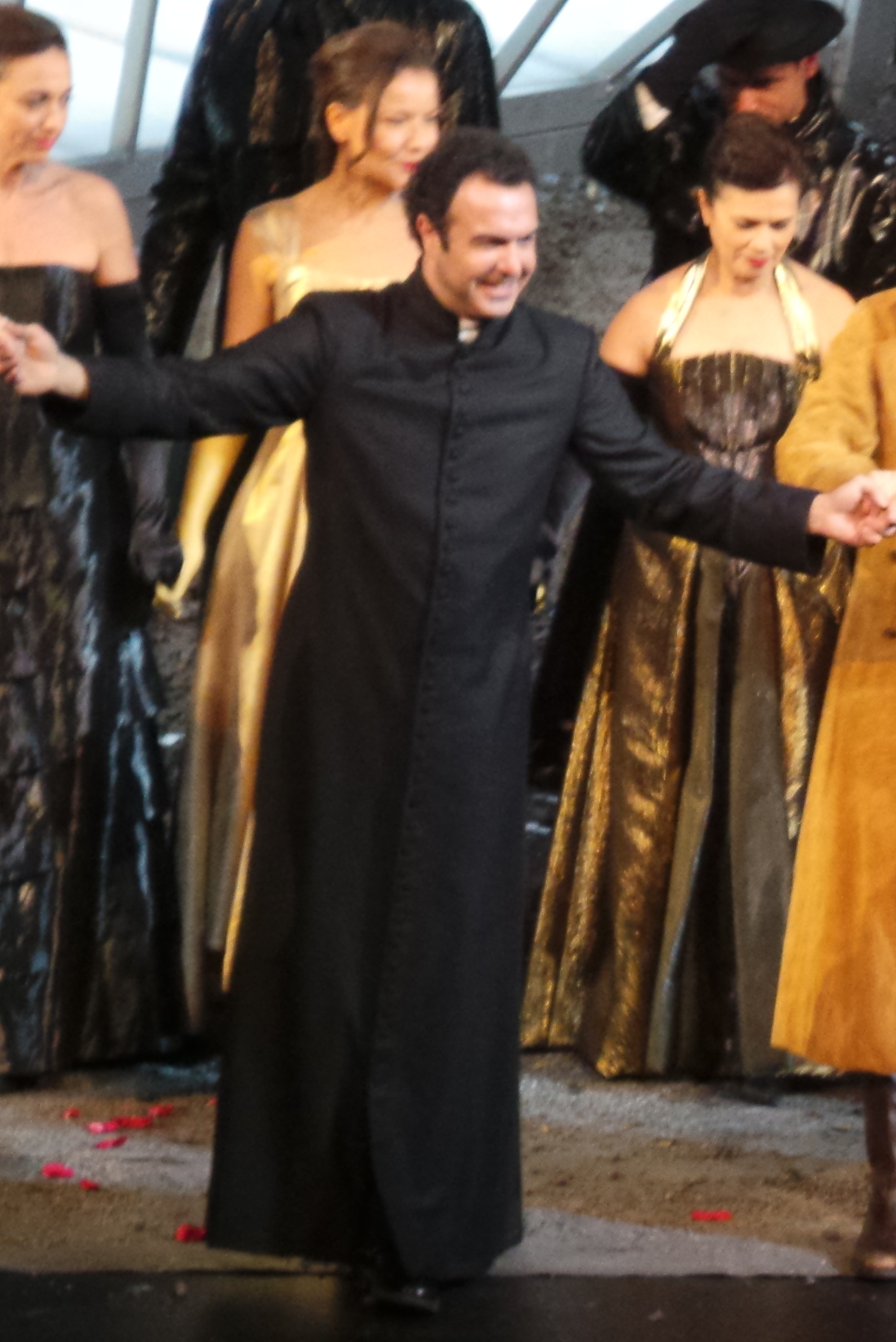 "Lucia di Lammermoor" con Juan Diego Flórez, Elena Mosuc, Marco Caria, Simón Orfila en el Gran Teatre del Liceu de Barcelona. Diciembre de 2015